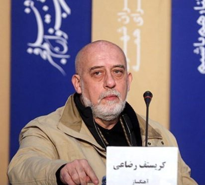 کریستف رضاعی - نشست خبری فیلم عامه‌پسند در سی و هشتمین دوره جشنواره فیلم فجر ۱۳۹۸